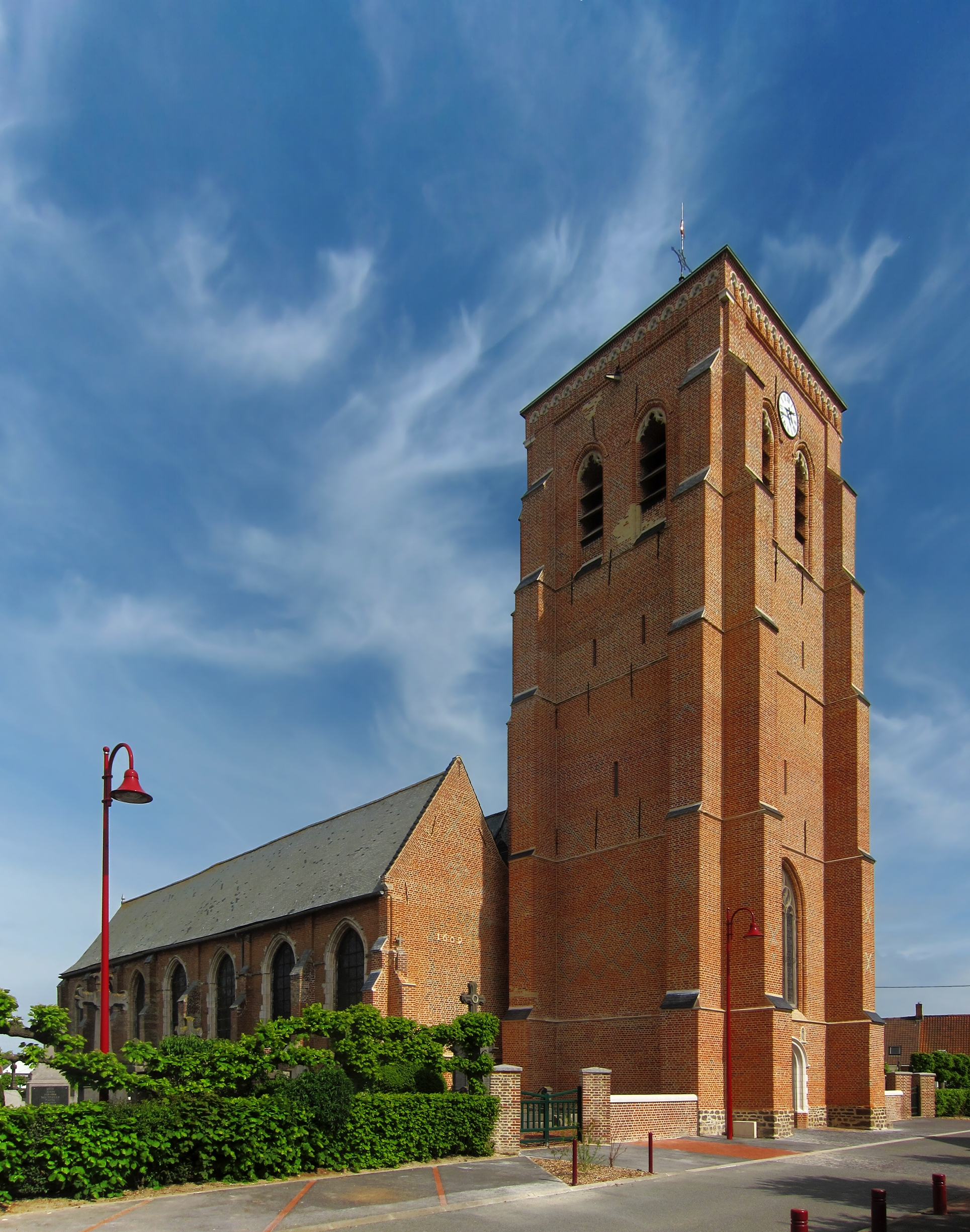 L'église Saint-Martin d'Arnèke.